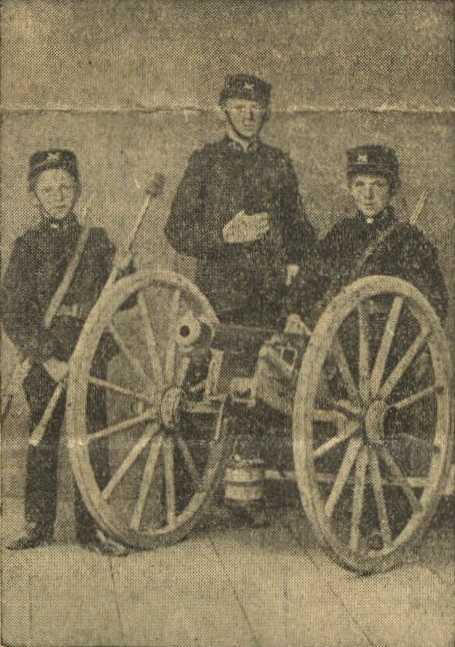 „Schöttle und seine Brüder als Jungmannen“ (Georg Schöttle und seine zwei Brüder als Mitglieder der Jugendwehr), um 1835.